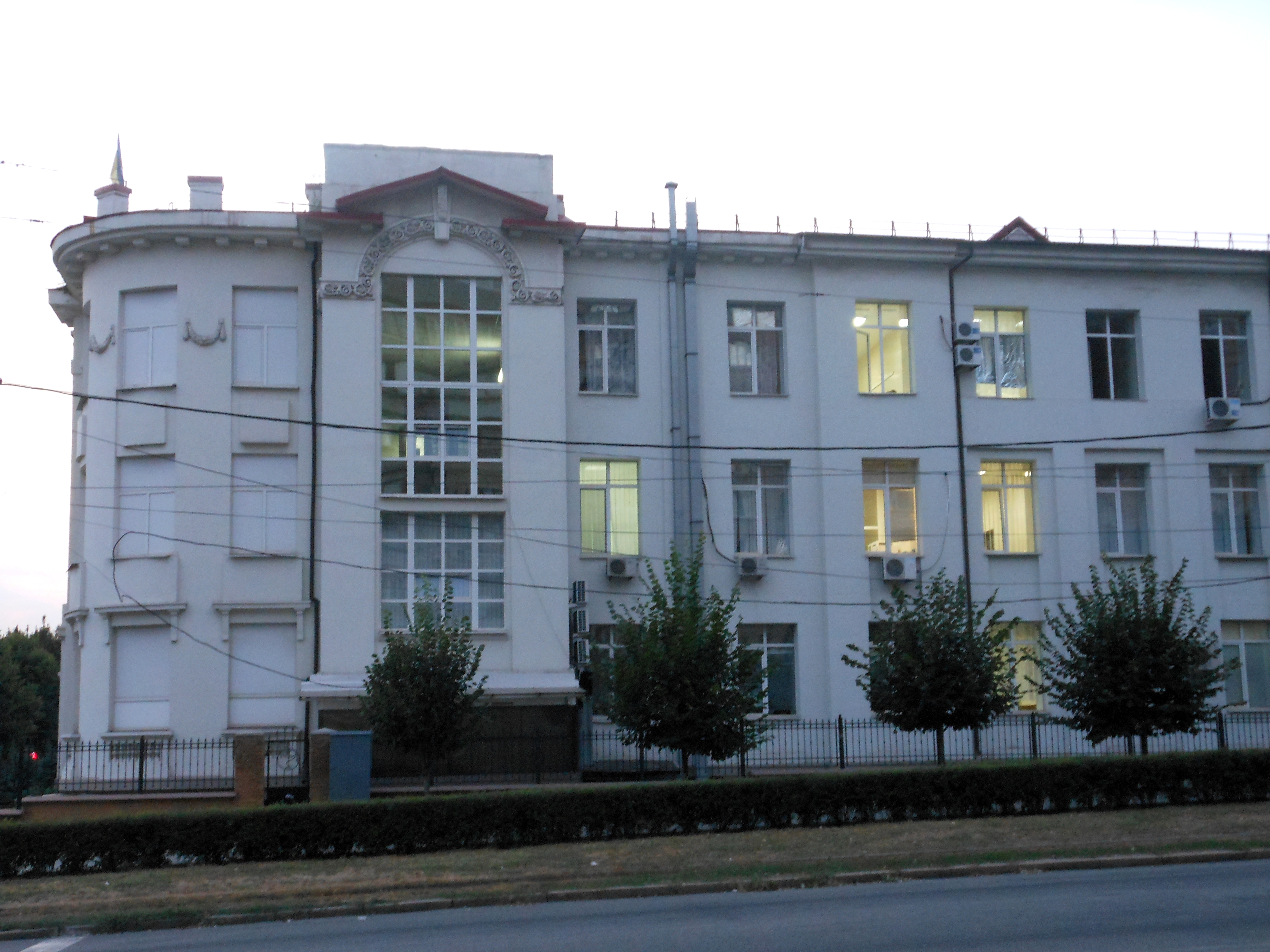 Земська лікарня (зараз Обласна дитяча лікарня), Запоріжжя, просп. Леніна, 70